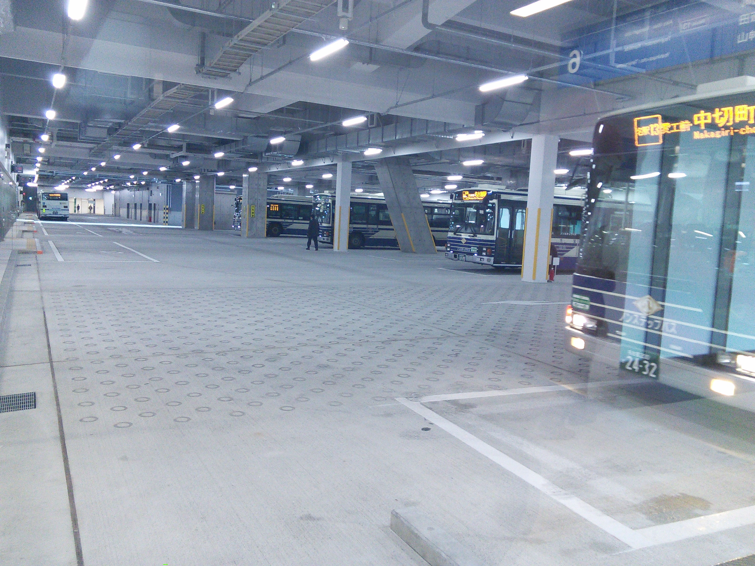 名古屋駅バスターミナルの6番のりばから撮影したバスターミナル内部の画像